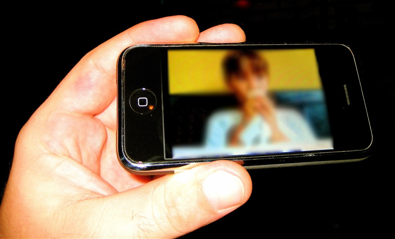 iPhone exibindo uma foto.